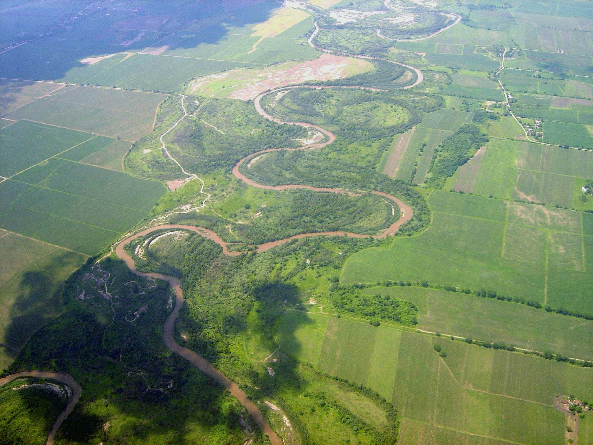 Salí River near San Miguel de Tucumán